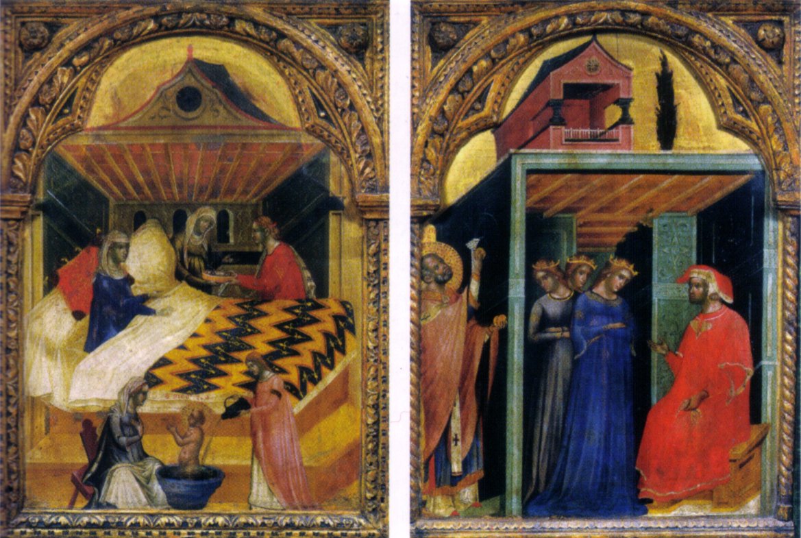 Paolo veneziano, due storie di san nicola.jpg